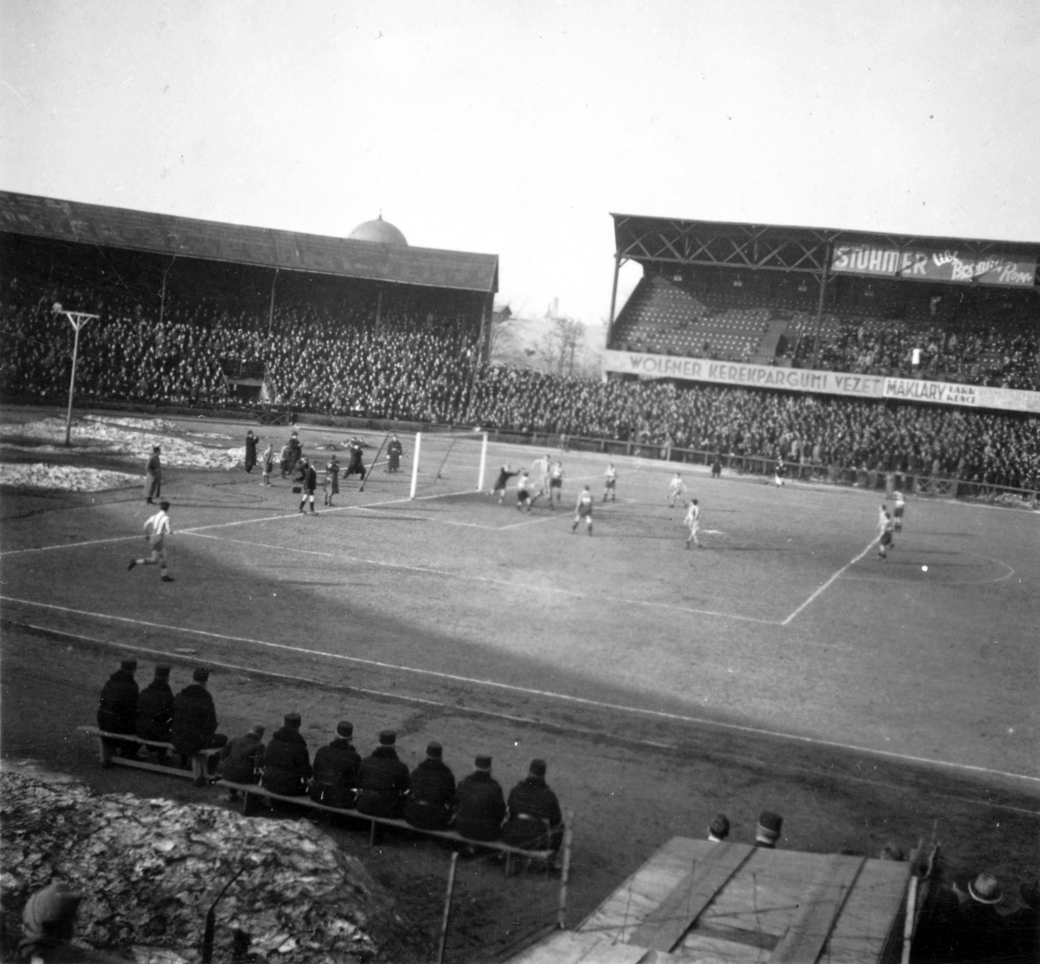 Üllői út, FTC pálya, szemben a B tribün, balra a háttérben a Rezső téri templom kupolája